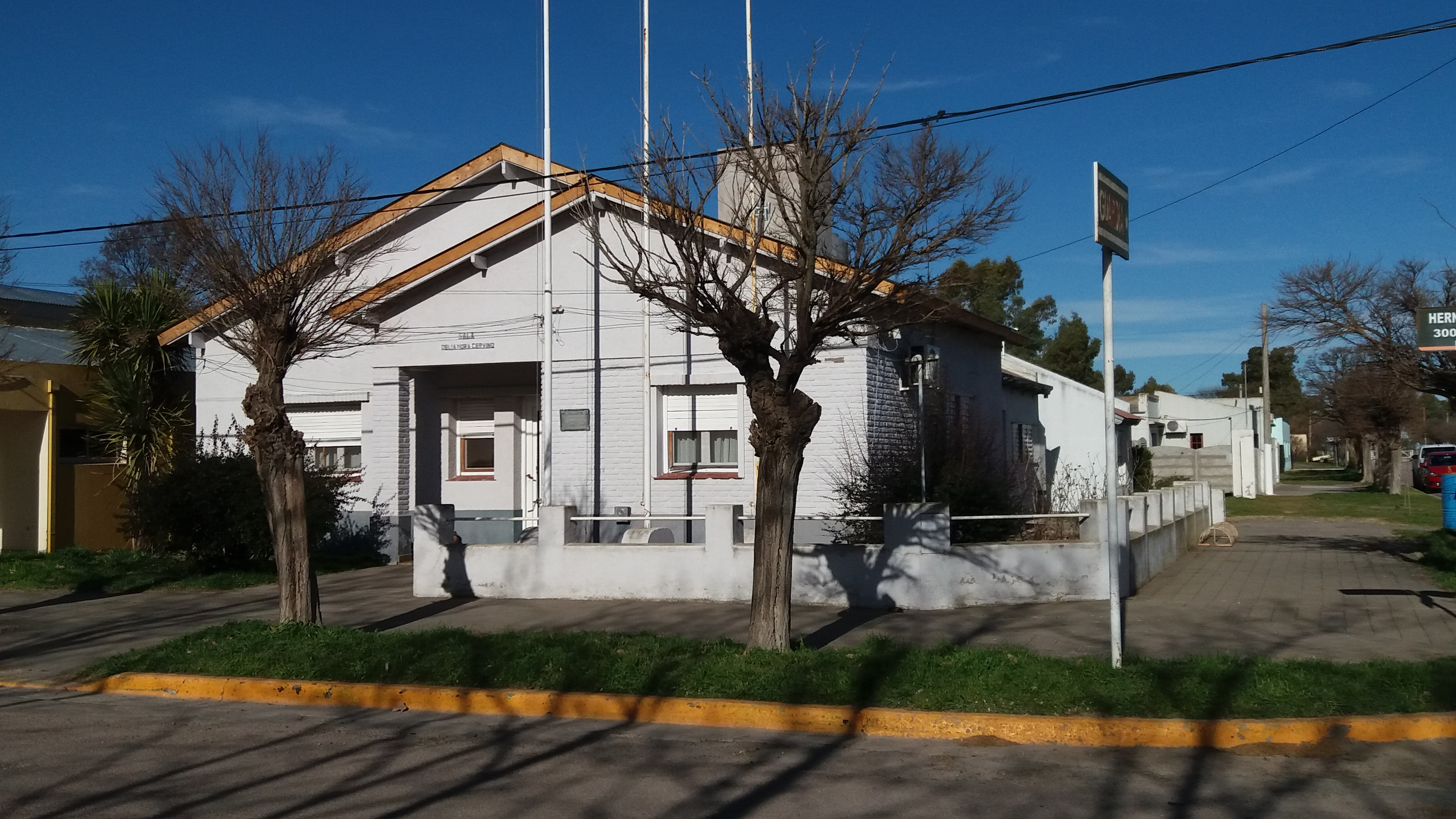 Sala médica Delia Nora Cervino (Diecisiete de Agosto, Partido de Puan, Provincia de Buenos Aires)